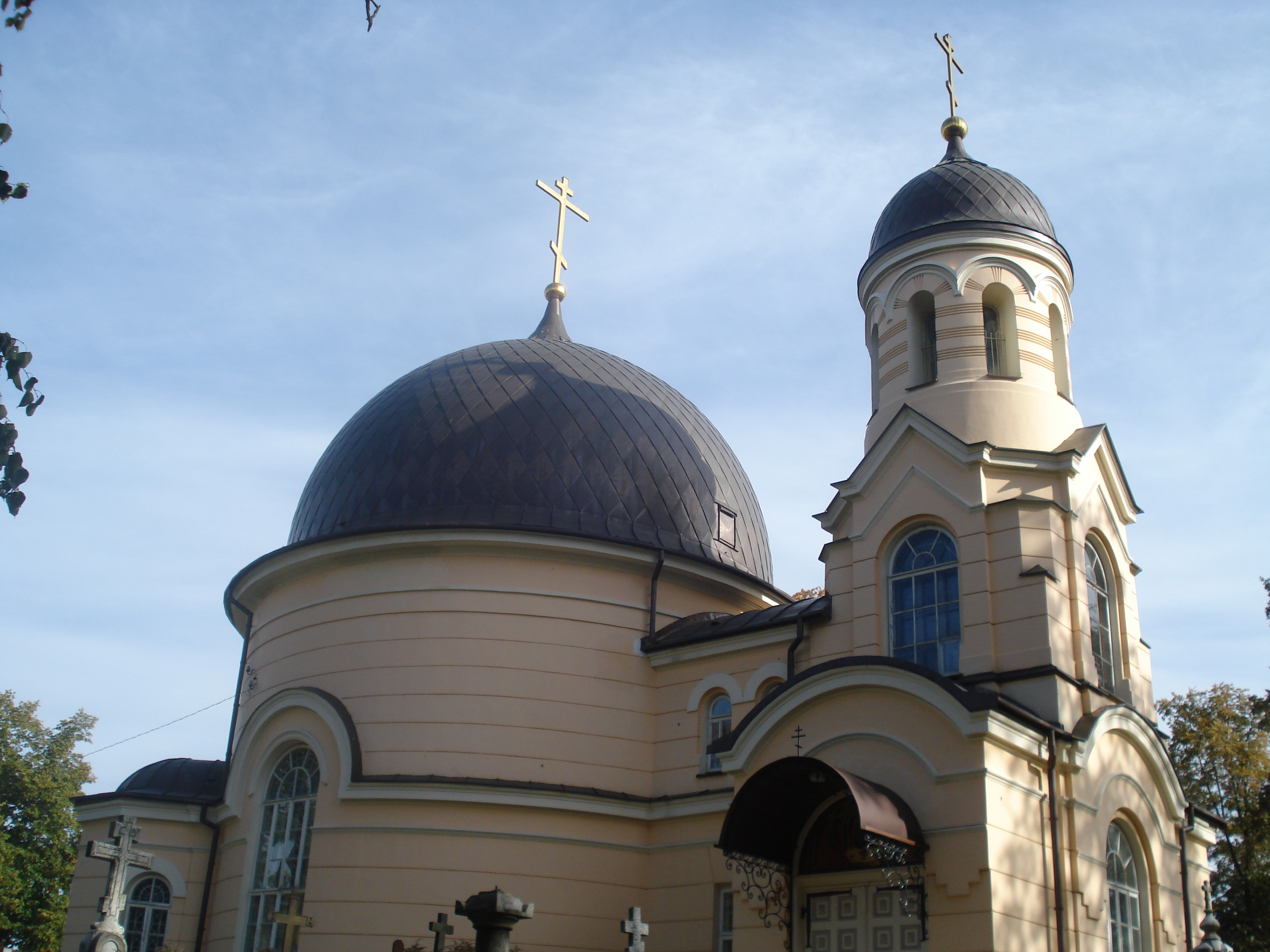 Orthodox Church of Saint Euphrosyne in Vilnius (Liepkalnių g.)